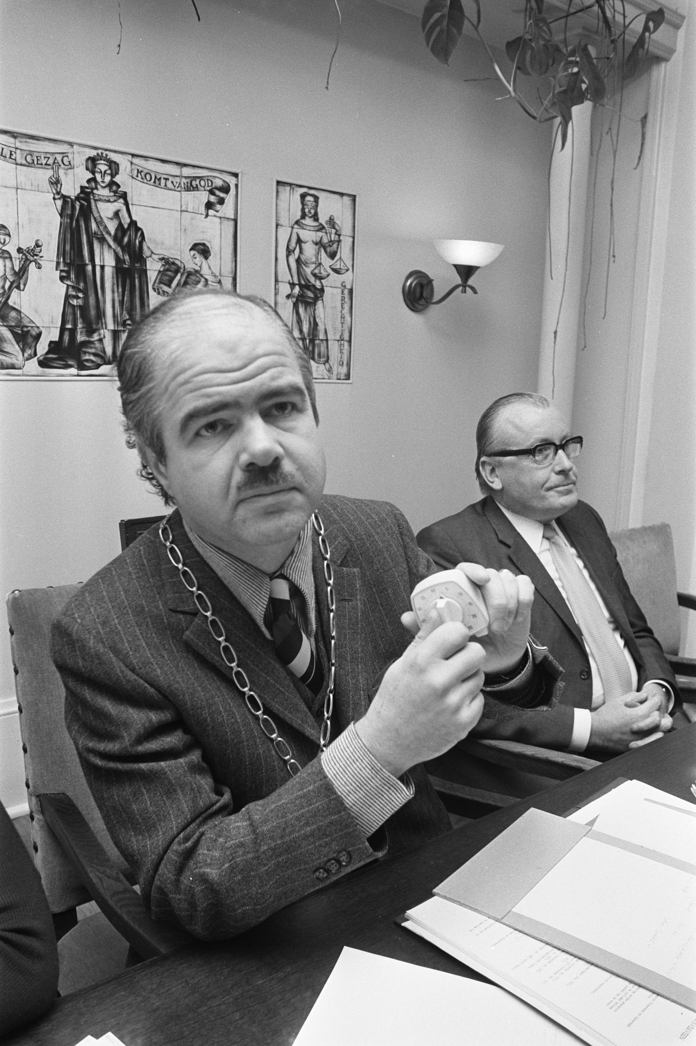 Collectie / Archief : Fotocollectie Anefo Reportage / Serie : [ onbekend ] Beschrijving : Gemeenteraadsvergadering Vinkeveen, opdracht Volkskrant, Burgemeester Th. Elsen windt klok op Datum : 16 november 1972 Locatie : Utrecht, Vinkeveen Trefwoorden : burgemeesters Persoonsnaam : Elsen, Th. Fotograaf : Mieremet, Rob / Anefo Auteursrechthebbende : Nationaal Archief Materiaalsoort : Negatief (zwart/wit) Nummer archiefinventaris : bekijk toegang 2.24.01.05 Bestanddeelnummer : 926-0280